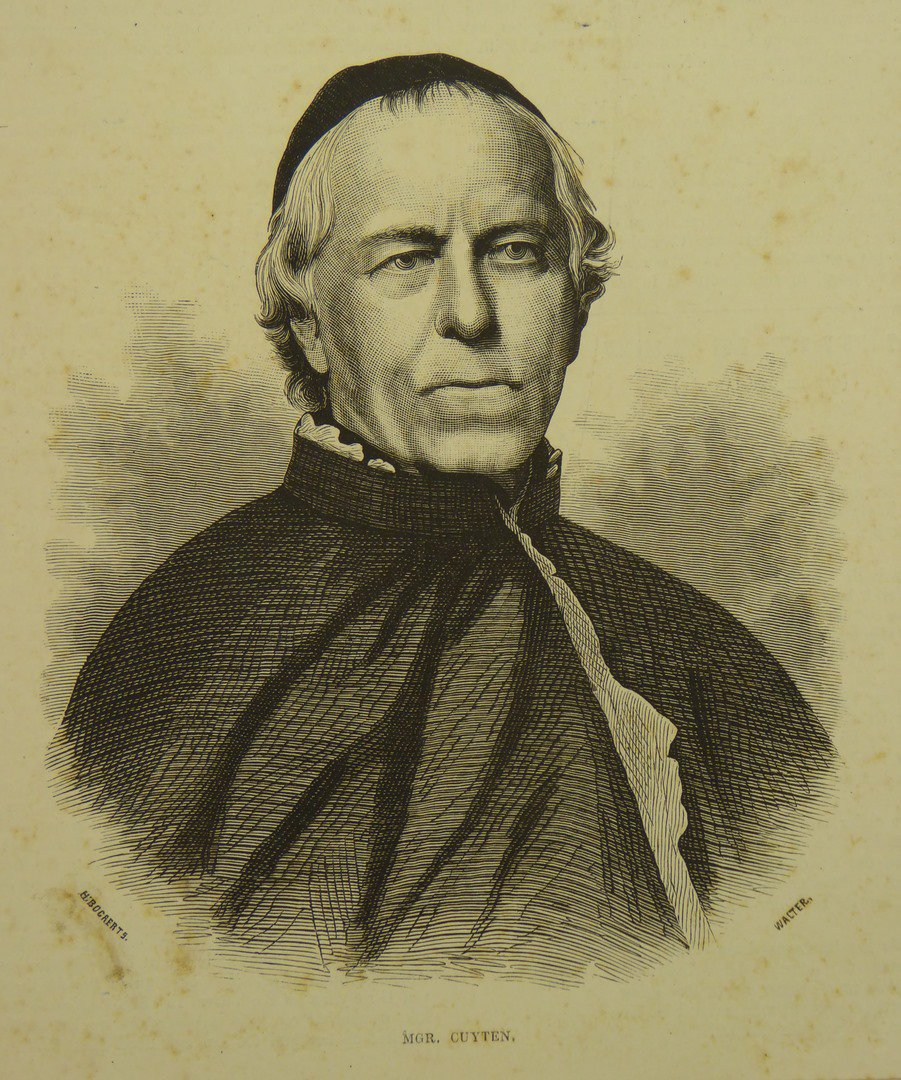 Mgr. Jacobus Cuyten (1799-1884), president seminarie Nieuw-Herlaar, gravure J. Walter (coll. Catharijne Convent)